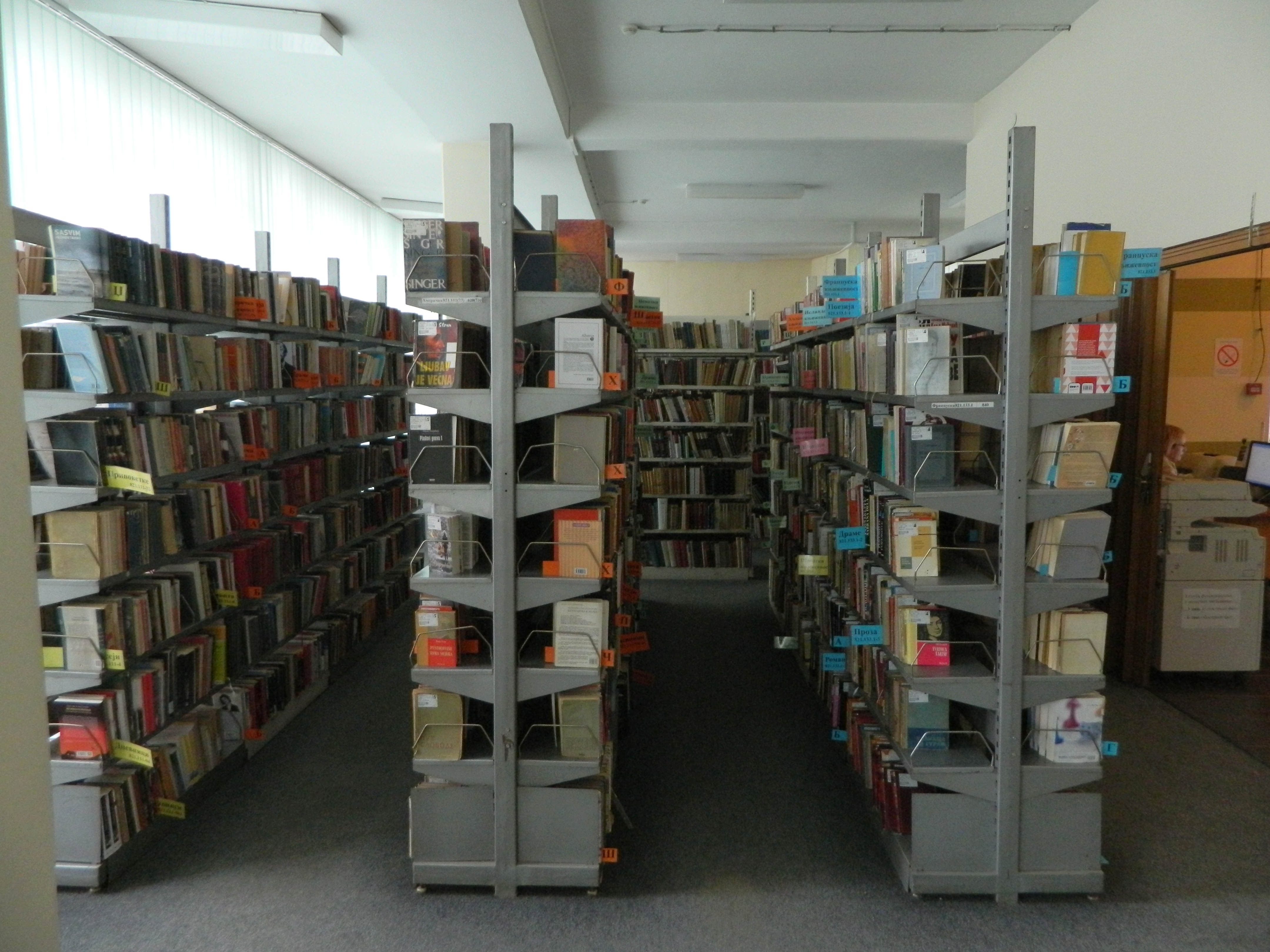 Јавна библиотека “Бора Станковић” Врање